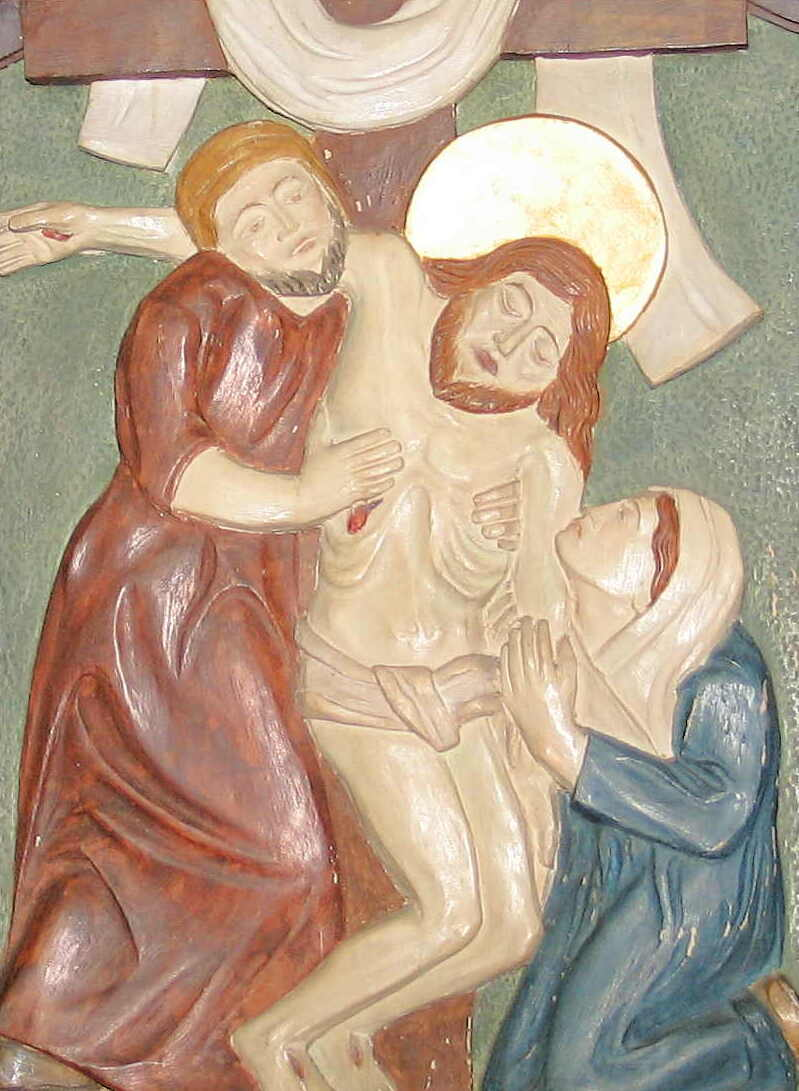 Statioun an der Kierch zu Wäicherdang